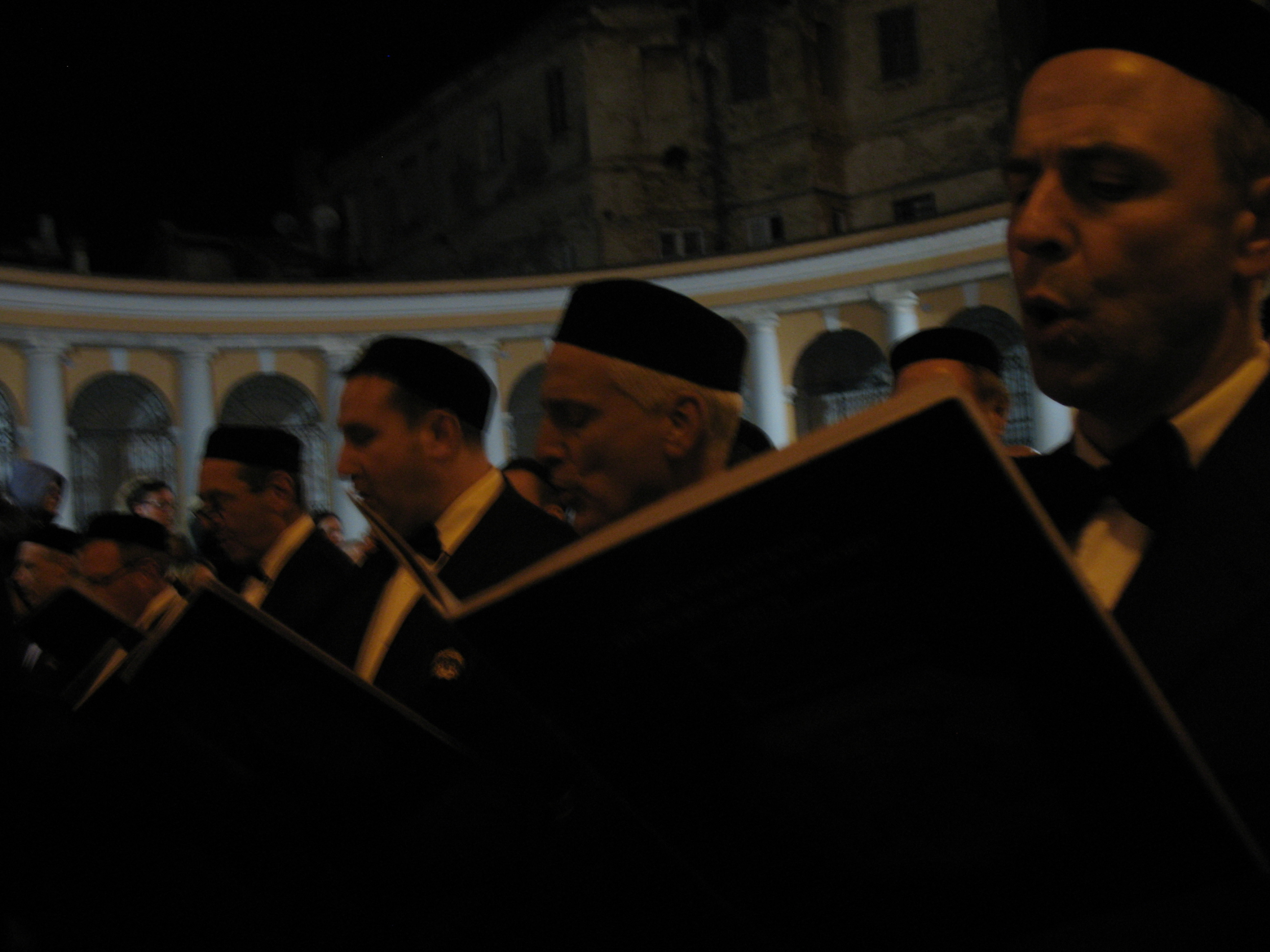 Durante la Processione del Venerdì Santo di Chieti viene eseguito il "miserere" di Selecchy.